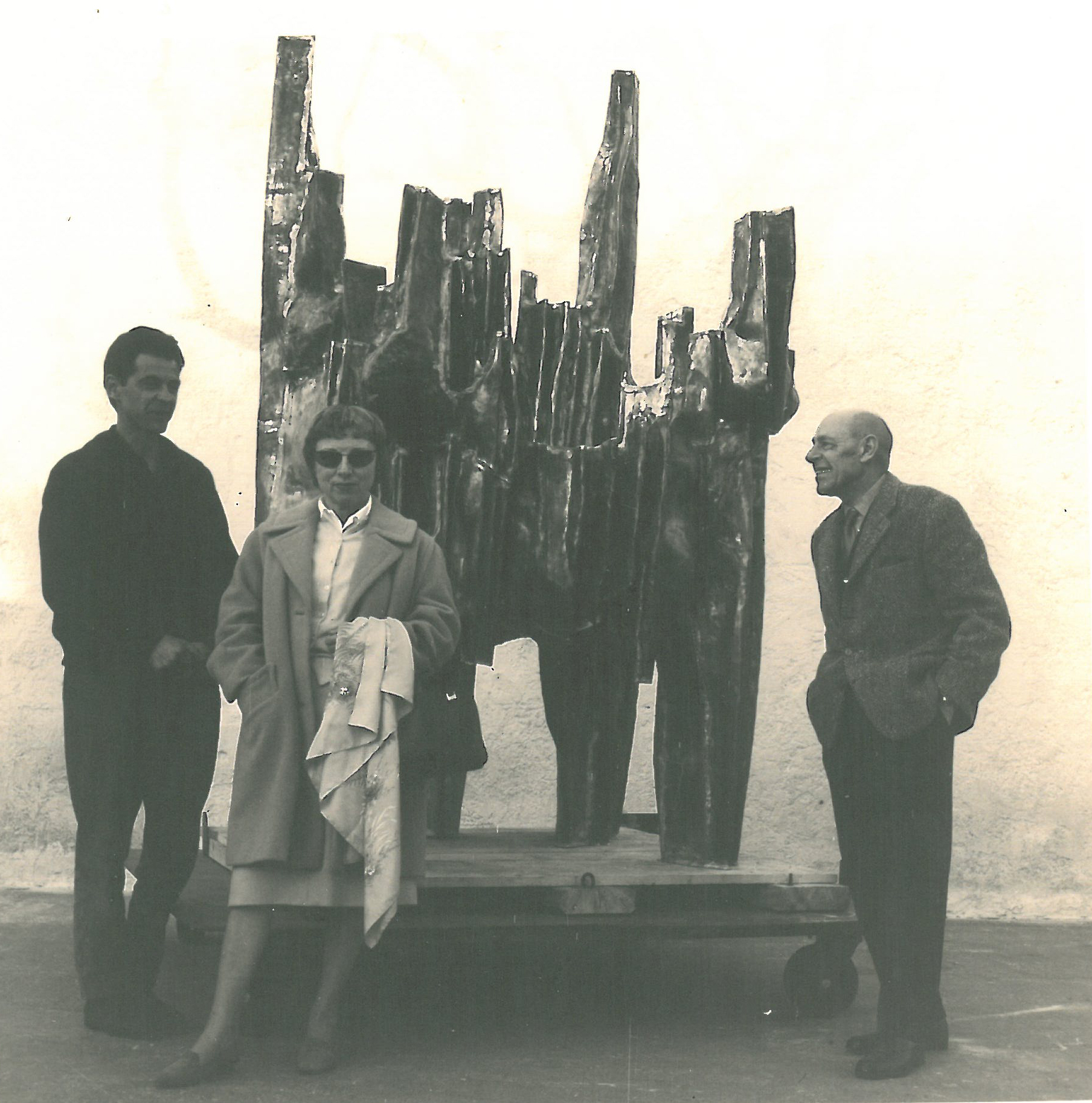 Jean Vincent de Crozals, Jean Dubuffet (à droite) et épouse Dubuffet à Gaudissart en 1964 devant la sculpture "La physique" de de Crozals